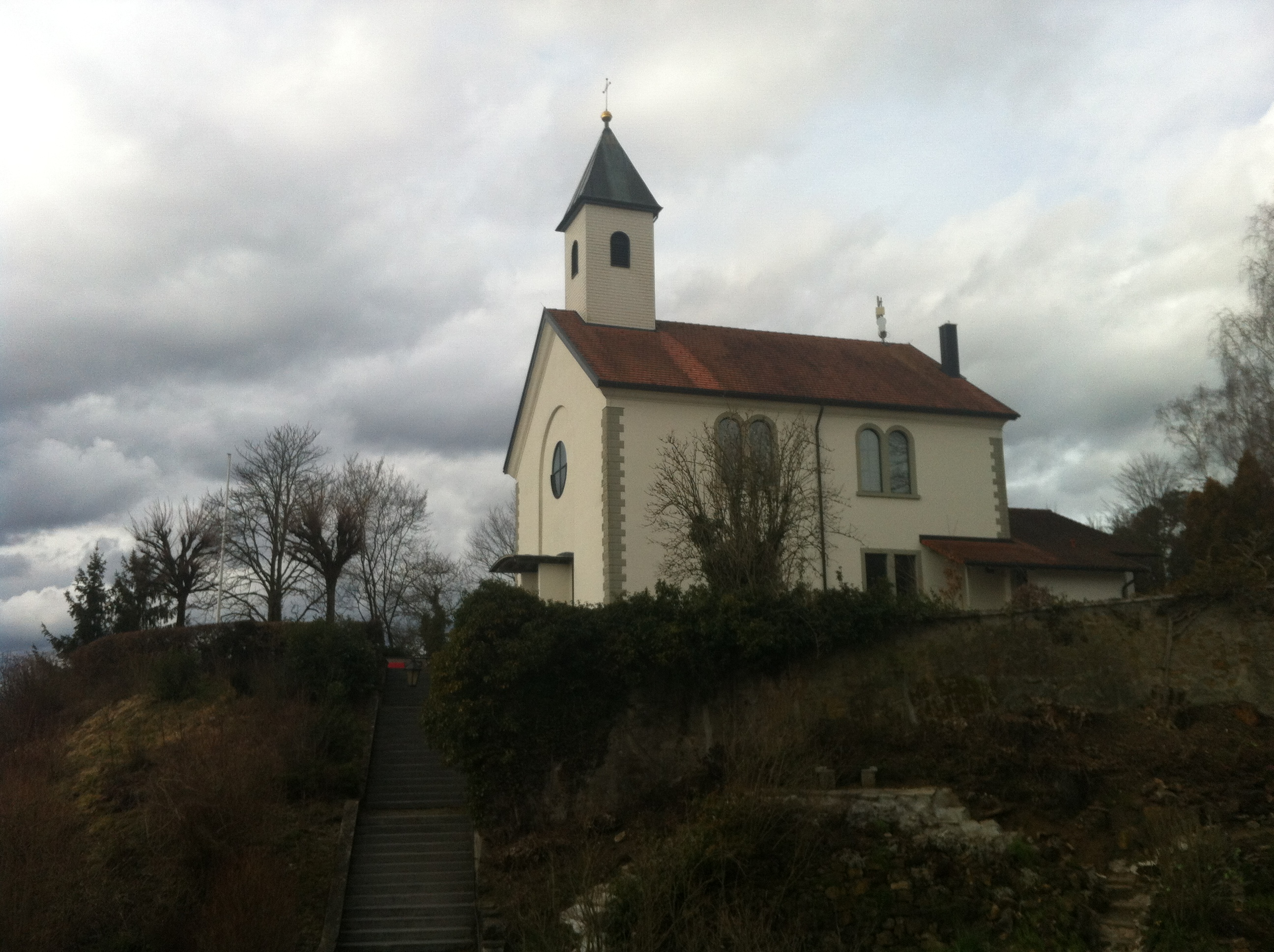 Die evangelische Bergkirche (erbaut 1832) in Kadelburg, Gemeinde Küssaberg in Baden-Württemberg.